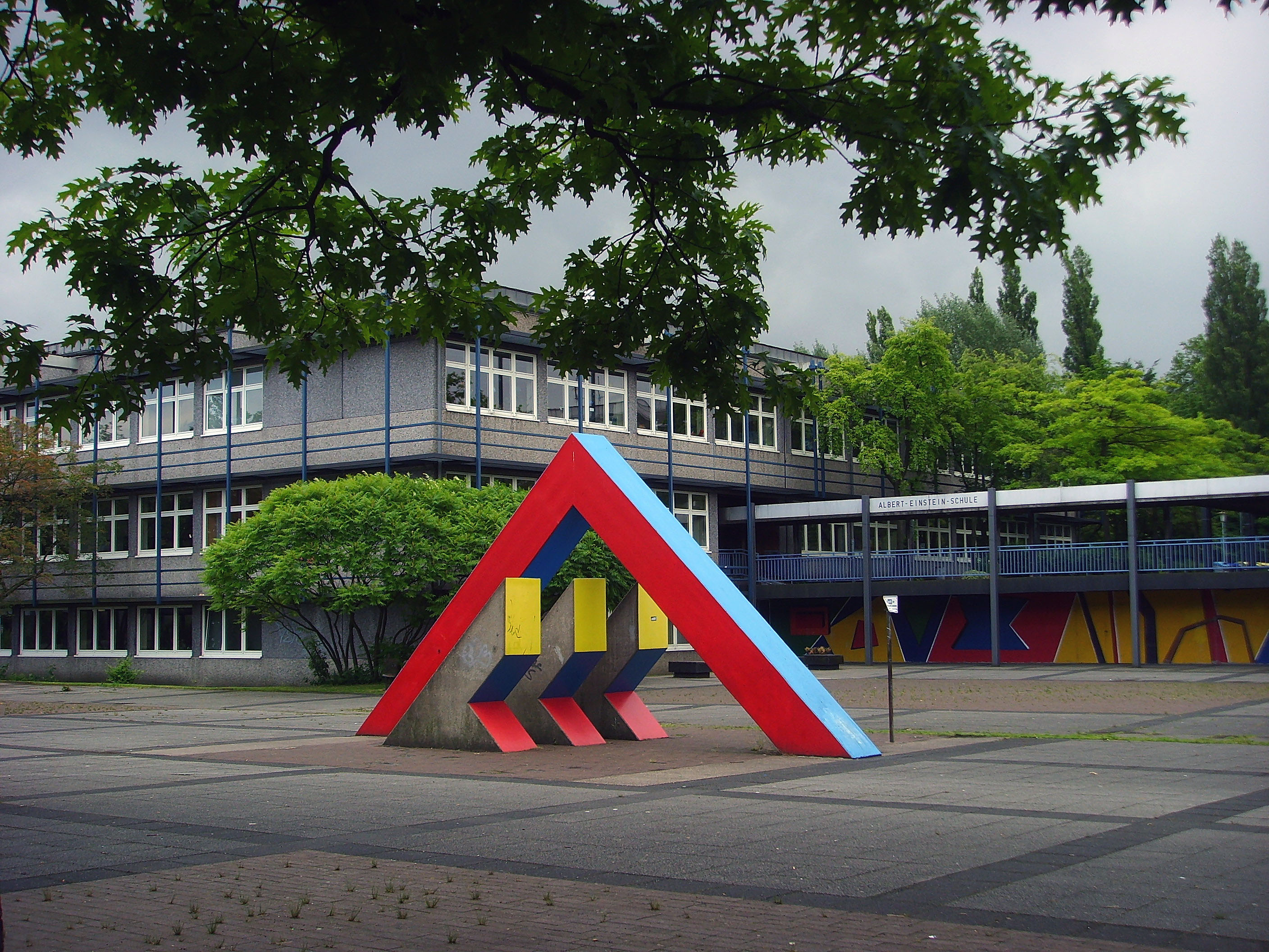 Ansicht der Albert-Einstein-Schule, Gymnasium, mit Plastik von Otto Herbert Hajek. Gebäude und Plastik wurden 2010/2011 abgerissen. Source: own work Date: June 2008, Bochum, Germany Author: Maschinenjunge Licence: GFDL, cc-by 3.0 de: Bochum